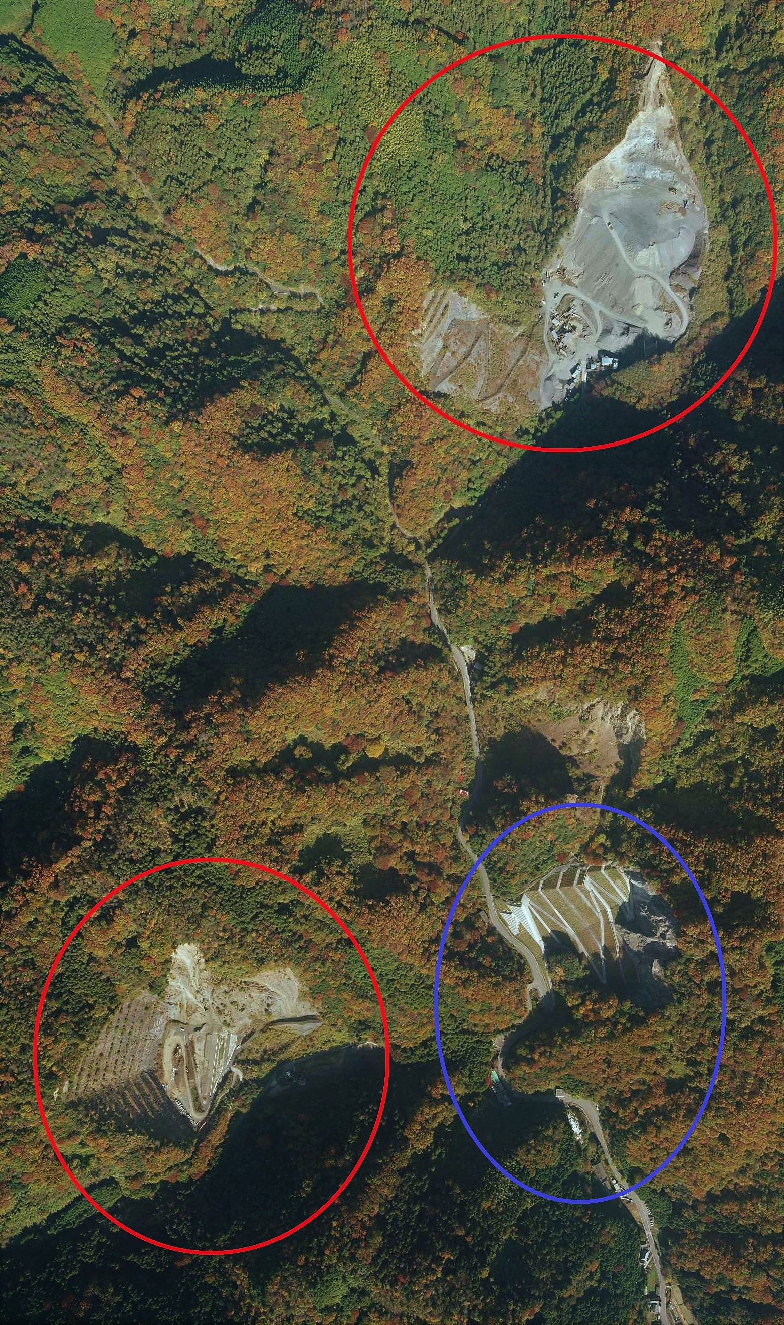 国土地理院 CCG20101-C6-12より切り出し。広島県の出口川湧水処理場の年次変化(2010年）。重金属を含む地下水が湧出した採石場の西側および北側に採石場が操業している。